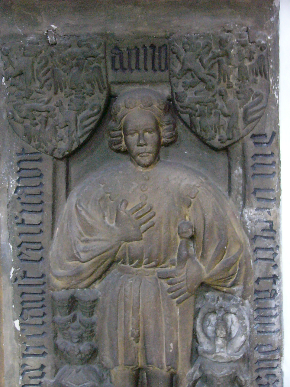 Otto (X.) von Weimar Orlamünde, Herr auf Lauenstein, Epitaph in der Kirche von Ludwigstadt